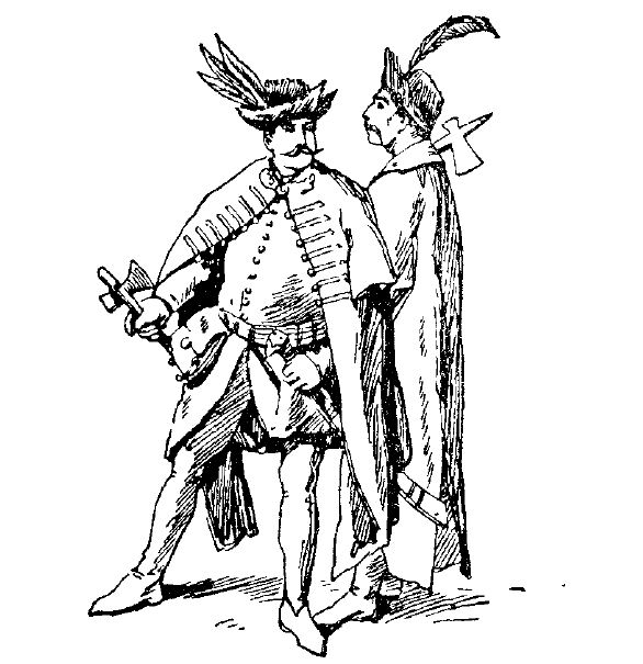 Piechota wegierska korzona